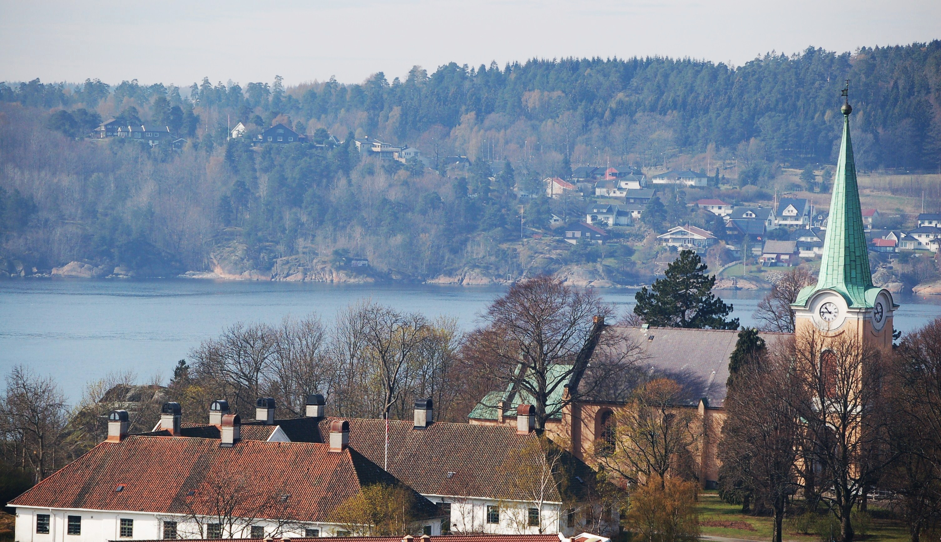 Laurvig Hospital og Larvik kirke